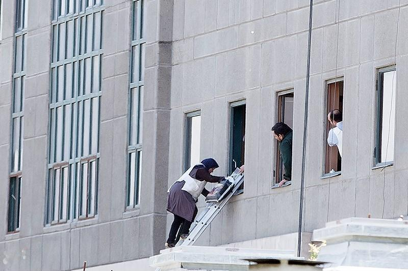 حمله تروریستی مجلس شورای اسلامی